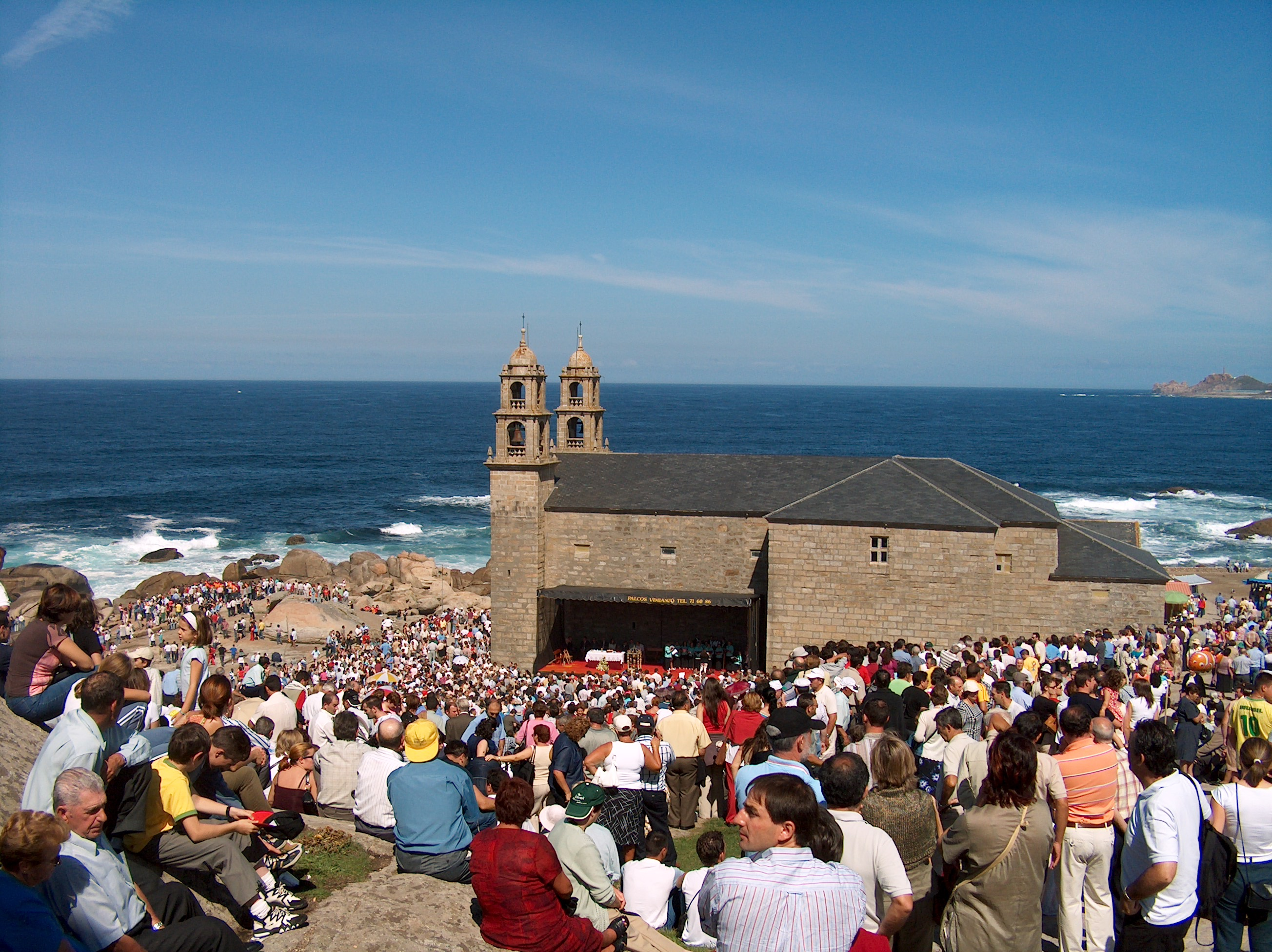 Muxía 20040912 Santuario da Virxe da Barca 12 Xente no exterior o día da romaría